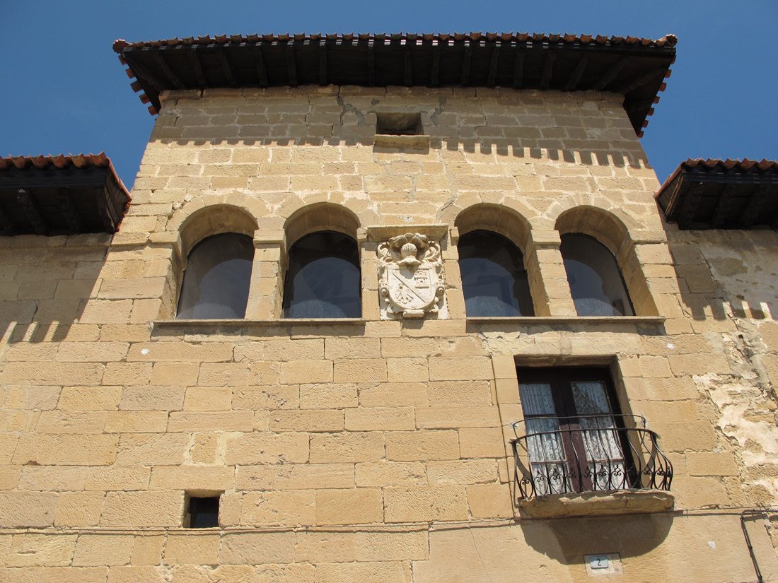 Detalle de la fachada del Palacio Sáenz de Santamaría en Rivabellosa (Ribera Baja/Erribera Beitia, Basque Autonomous Community, Spain).